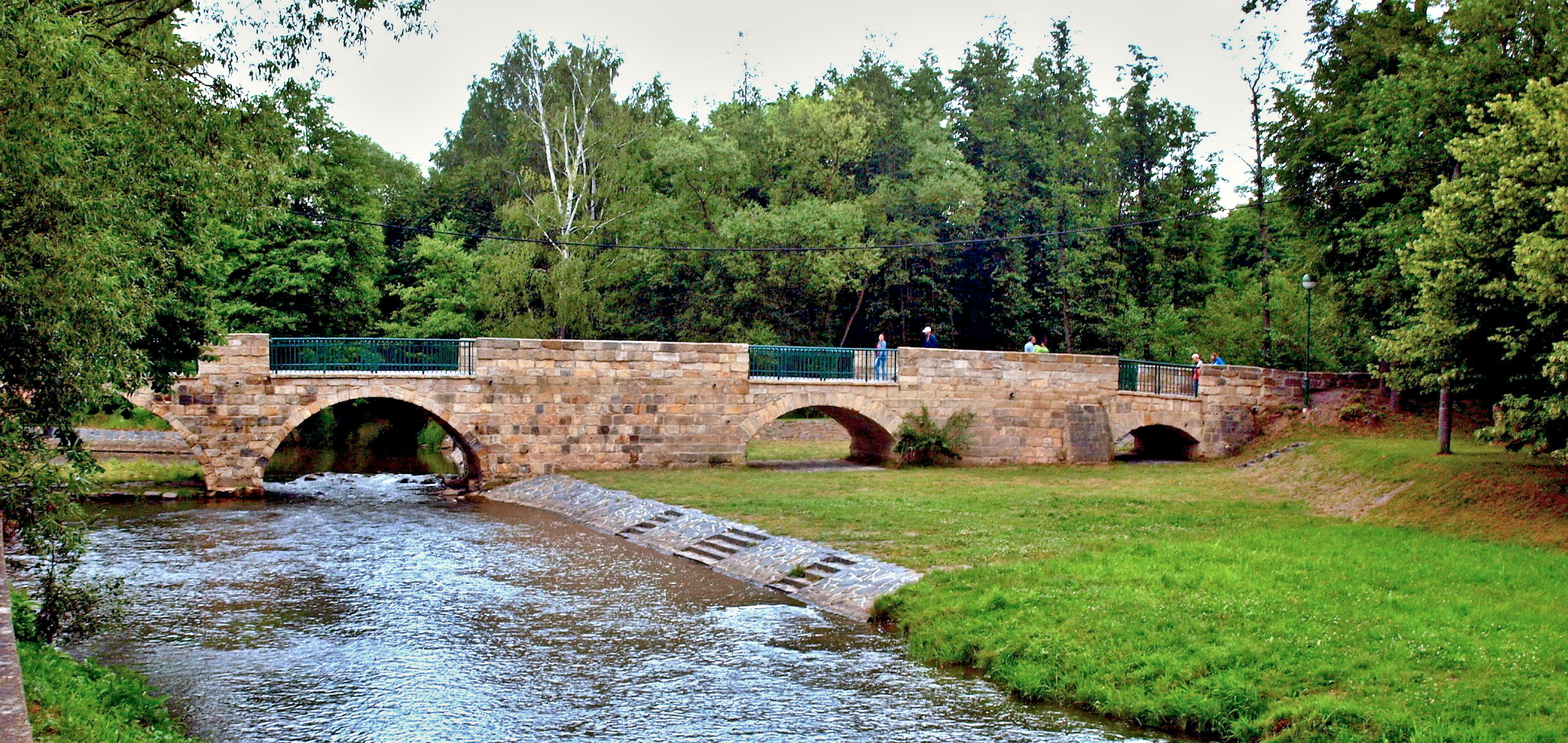 Nový Zámecký most v Mimoni